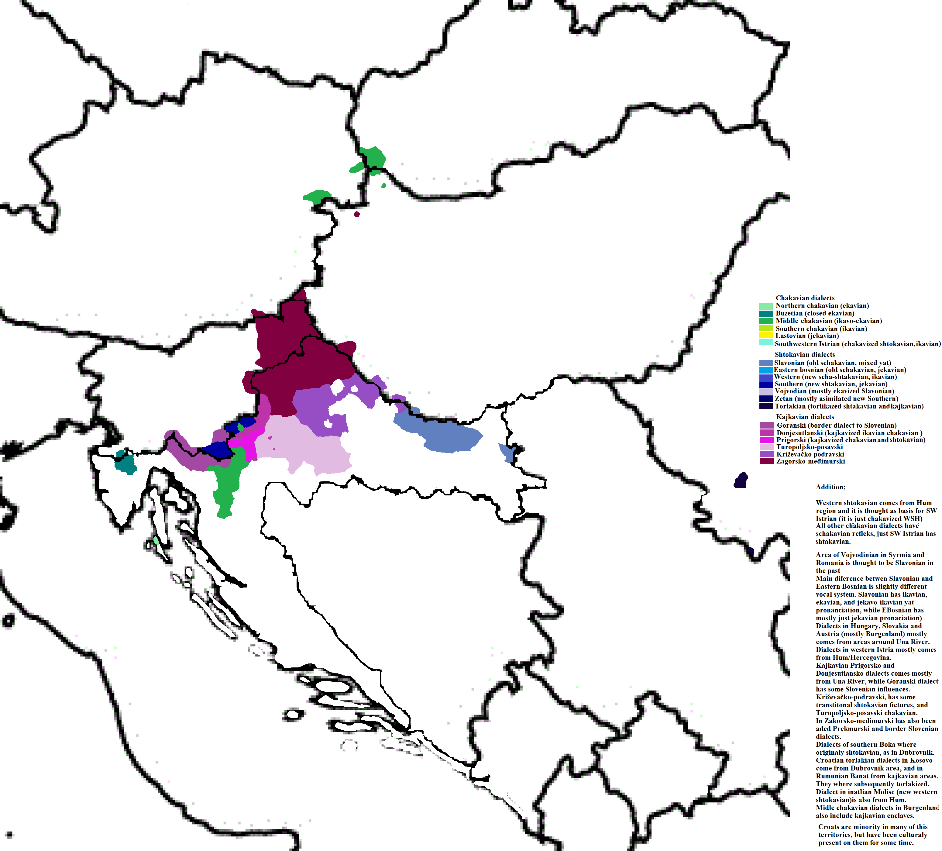 kajkavski i povezani dijalekti; na sjeveru gradišća srednječakavski obuhvaća i originalno kajkavske govore koji su kasnije (srednje)čakavizirani buzetski, žumberački i belokrajinski posjeduju vezu s kajkavskim govorima, torlački govori u banatu posjeduju isoglose turopoljsko-posavskog, pa se može govoriti i o torlakiziranim kajkavskim govorima podravski poddijalekt slavonskog je povezan s križevačko-podravskim govorima a sjever kontinentalno srednječakavsko dijeli pojedine isoglose s prigorskim i turopoljskim